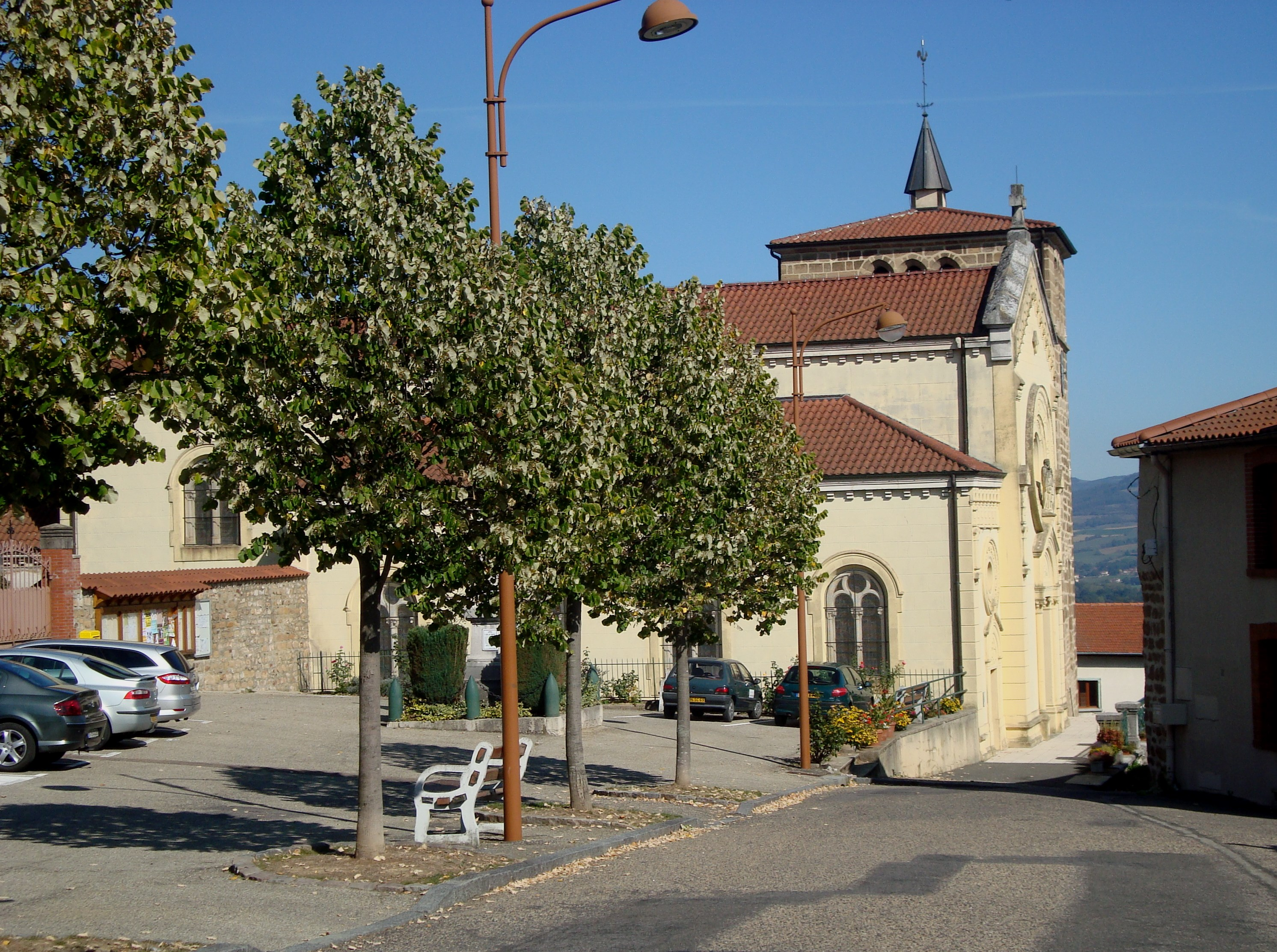 L'église Saint Pierre vue de la place Mangini, Meys, Rhône, France.